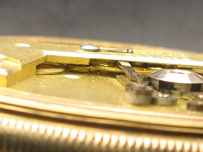 H.A.Lugrinの1876年取得の特許に基づく、ロンジンの1879年頃に製造された懐中時計クロノグラフ。画像は動力接続機構である垂直クラッチ(別軸)のアップ。